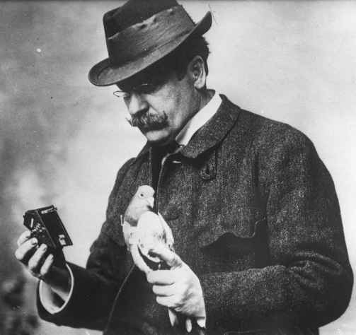 Appareil photographique miniature s'adaptant sous le ventre des pigeons voyageurs. Homme tenant d'une main l'appareil et de l'autre le pigeon. Cropped.